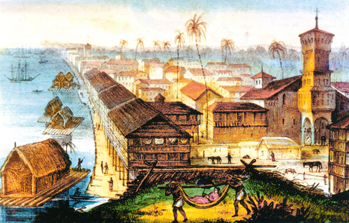 Un dibujo a lápiz realizado en 1846 por el viajero italiano Gaetano Osculatti, y que presenta una imagen de lo que era Guayaquil cuando estalló la revolución del 6 de marzo de 1845.